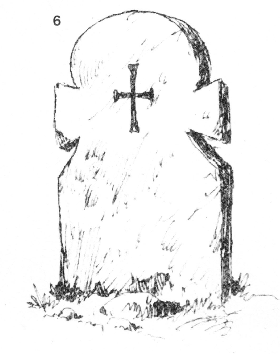 6. Кръст от бял мек варовит камък из гробището на с. Видбол, Видинско. Куклообразен, с полукръгло горно крило. На лицето му издълбано четирикрилно кръстче. Размери: 65x36x7 см. Датирано през 1881 г. Скициран на 8.VIII. 1930 г. (Т. 14, обр. 76.)